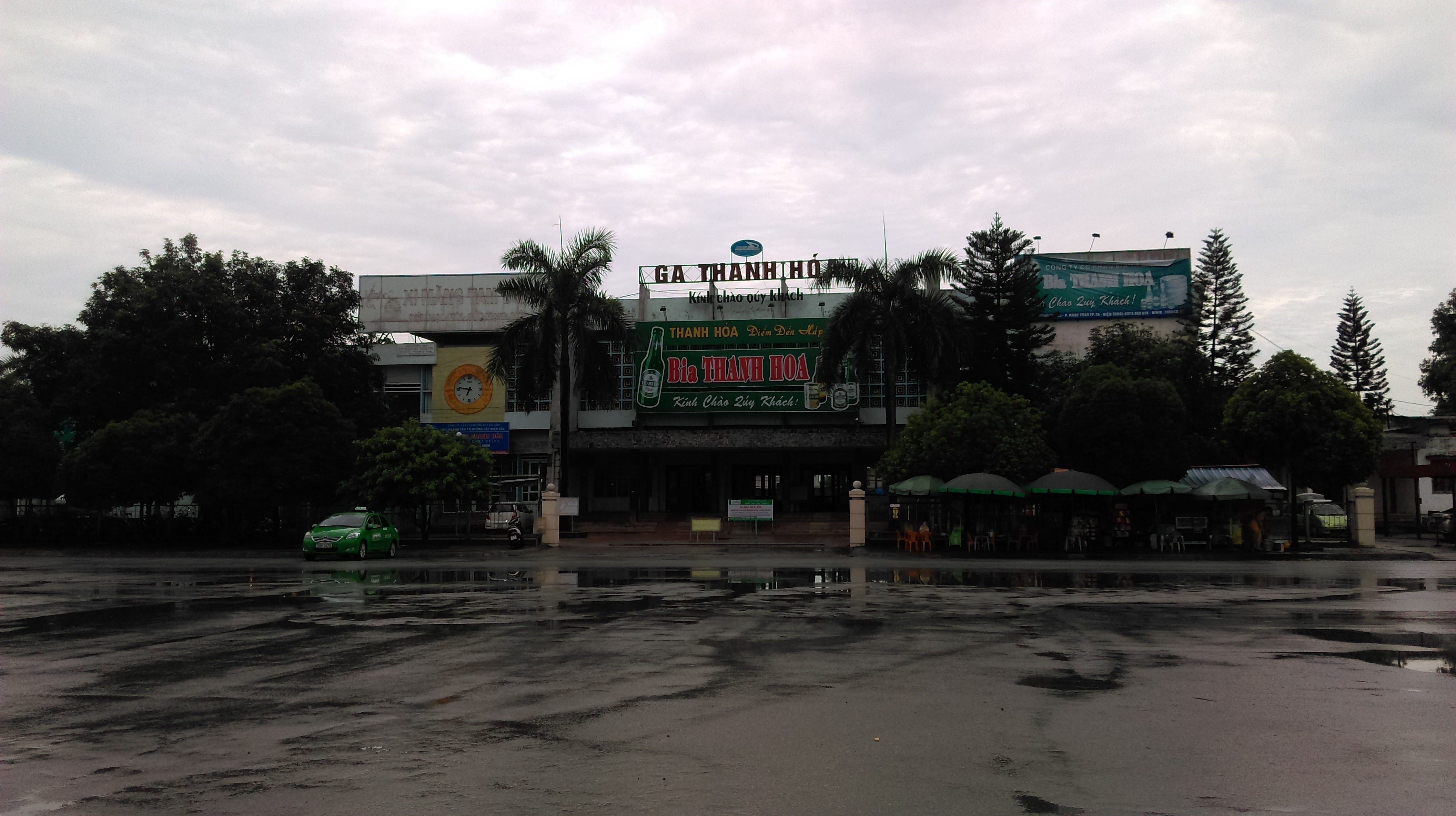 Ga Thanh Hóa